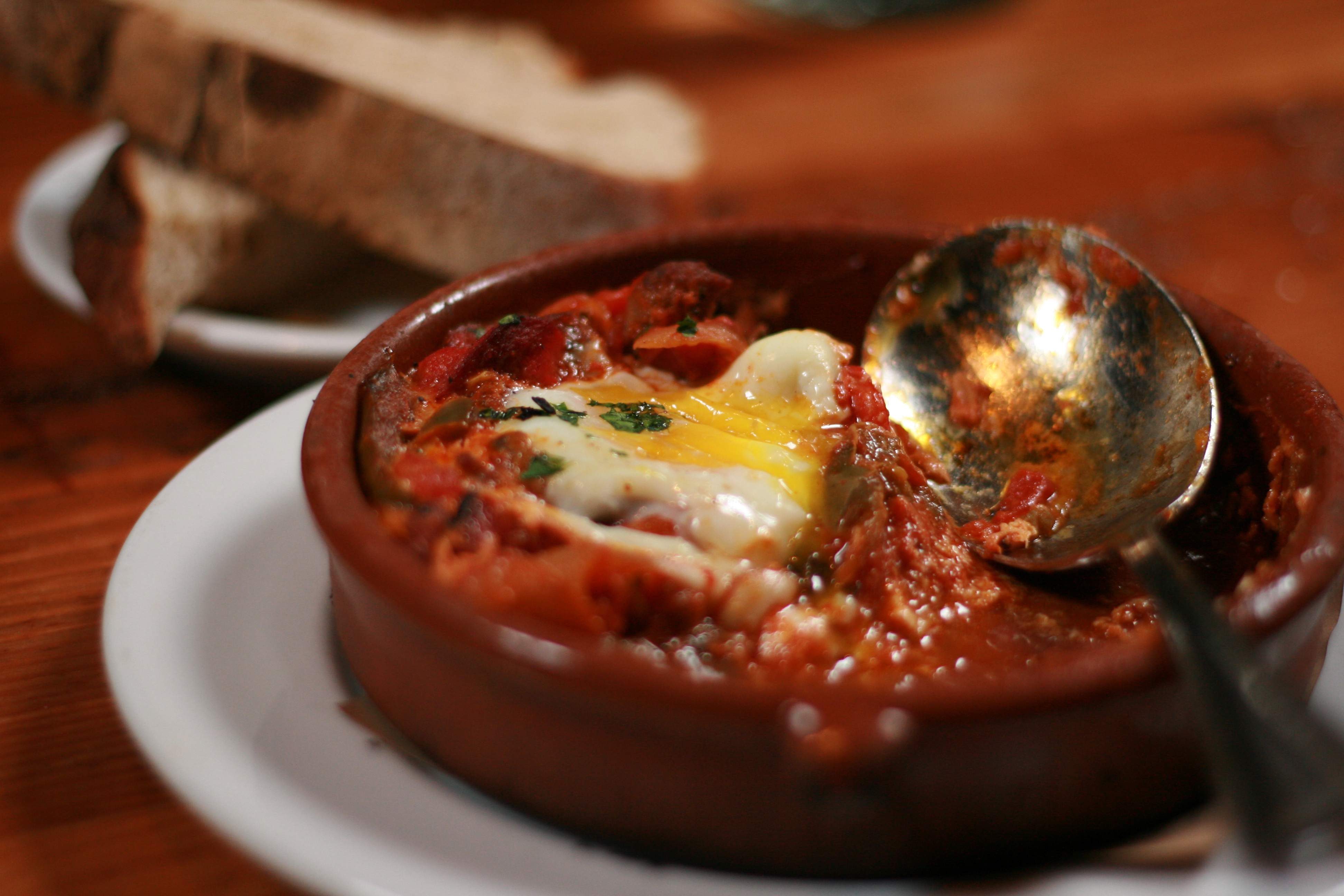 tasty n sons